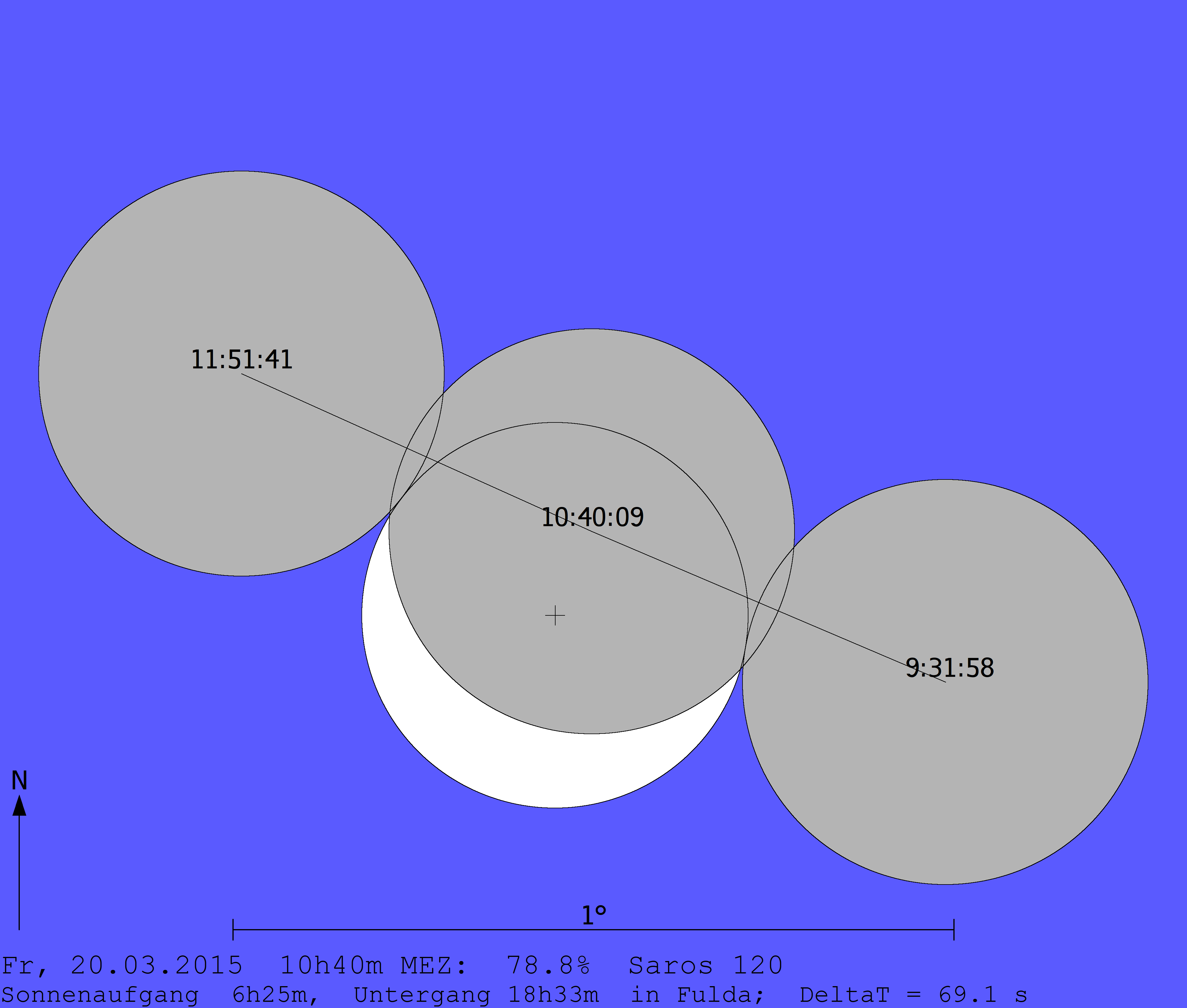 Verlauf der Sonnenfinsternis 20.03.2015 für einen Beobachter in Fulda. Zeiten für Finsternisbeginn (1. Kontakt), maximale Bedeckung und Finsternis-Ende (4. Kontakt) sind angegeben. Erstellt mit AstroWin32.